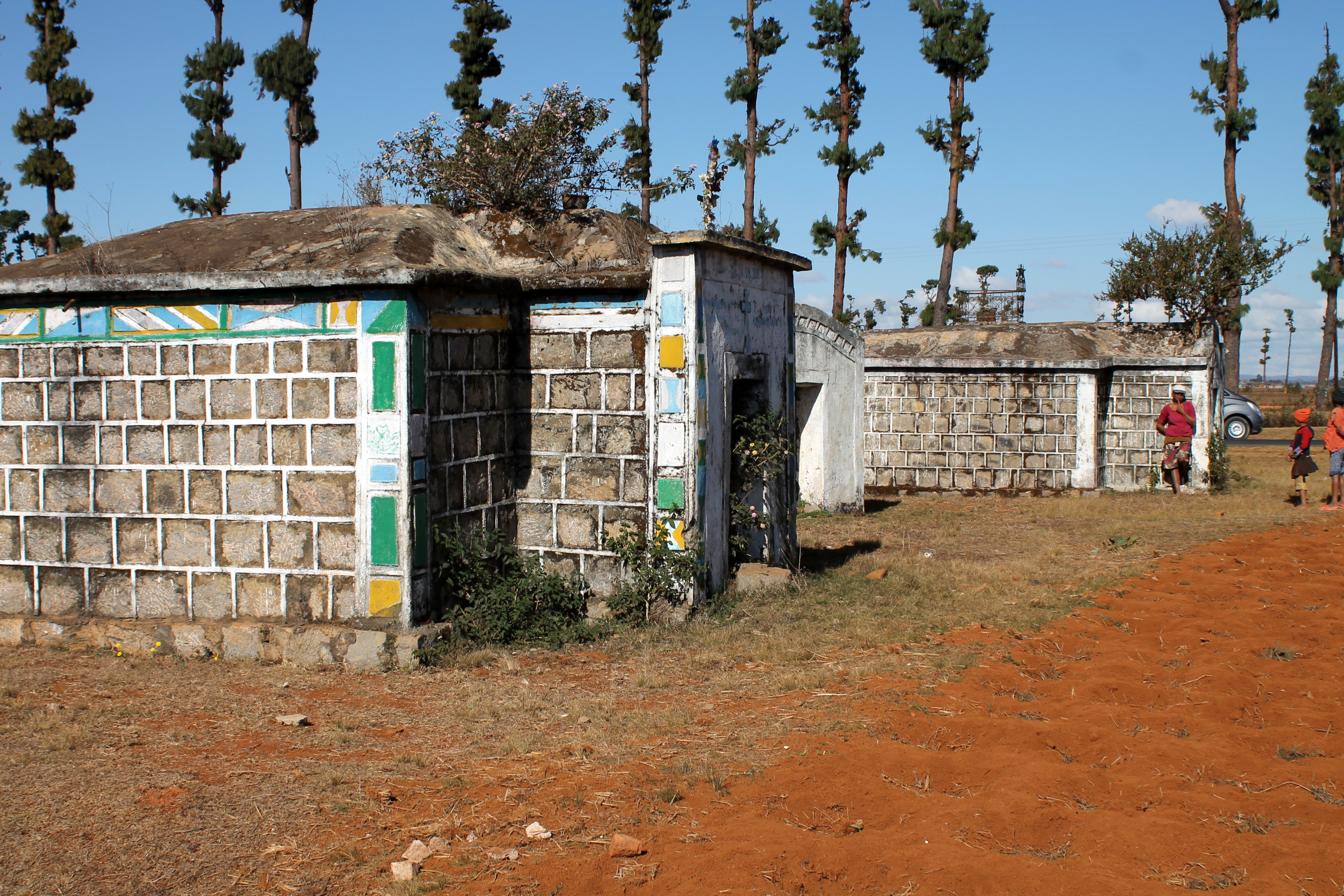 Merina